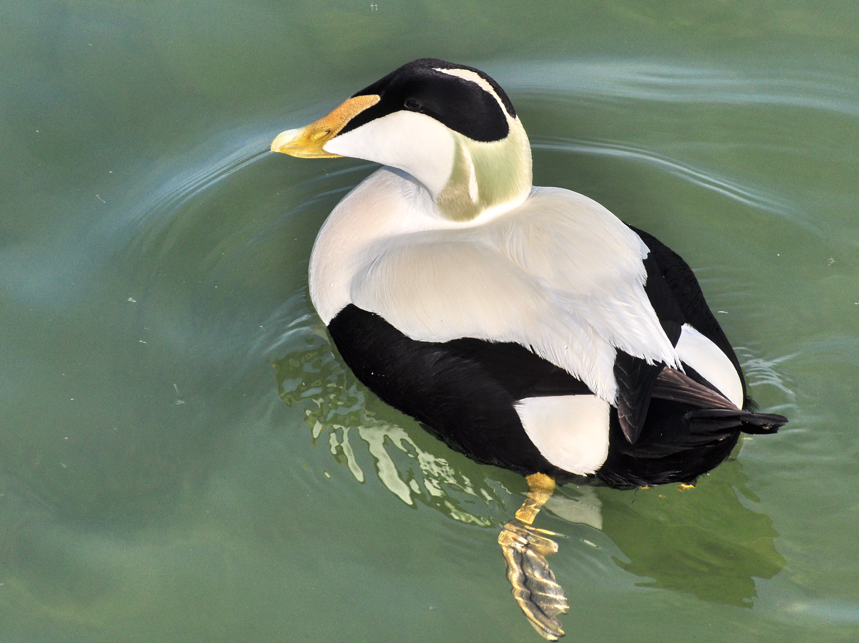 Somateria mollissima on Obersee (upper Lake Zürich) between Seedamm and the wooden bridge between Hurden and Rapperswil in Switzerland